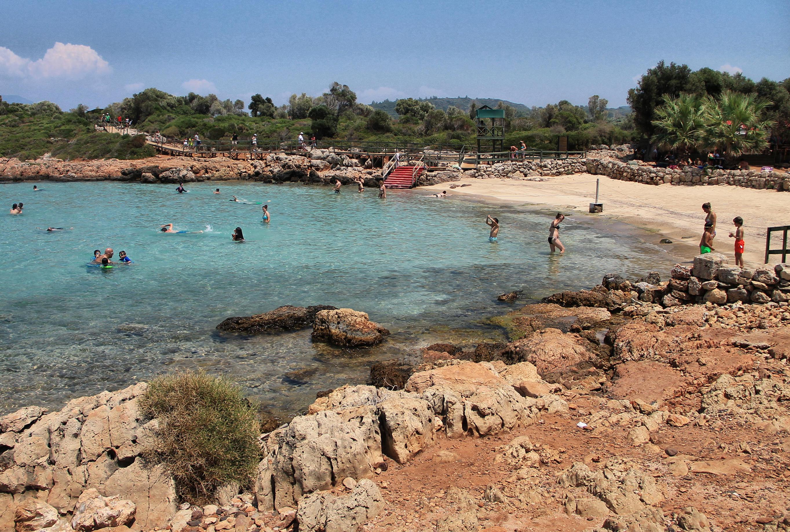 48710 Şehir Adası/Marmaris/Muğla, Turkey